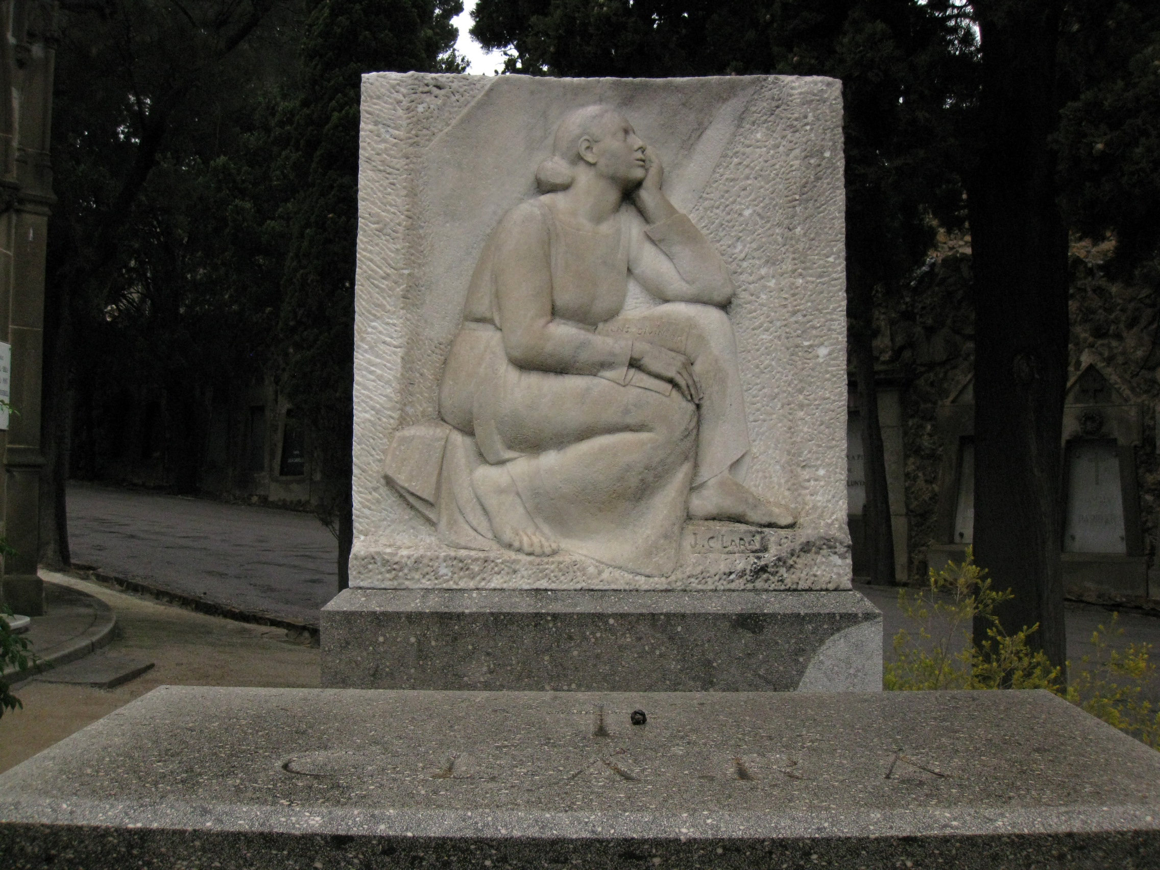 Cementiri de Montjuïc (Barcelona)